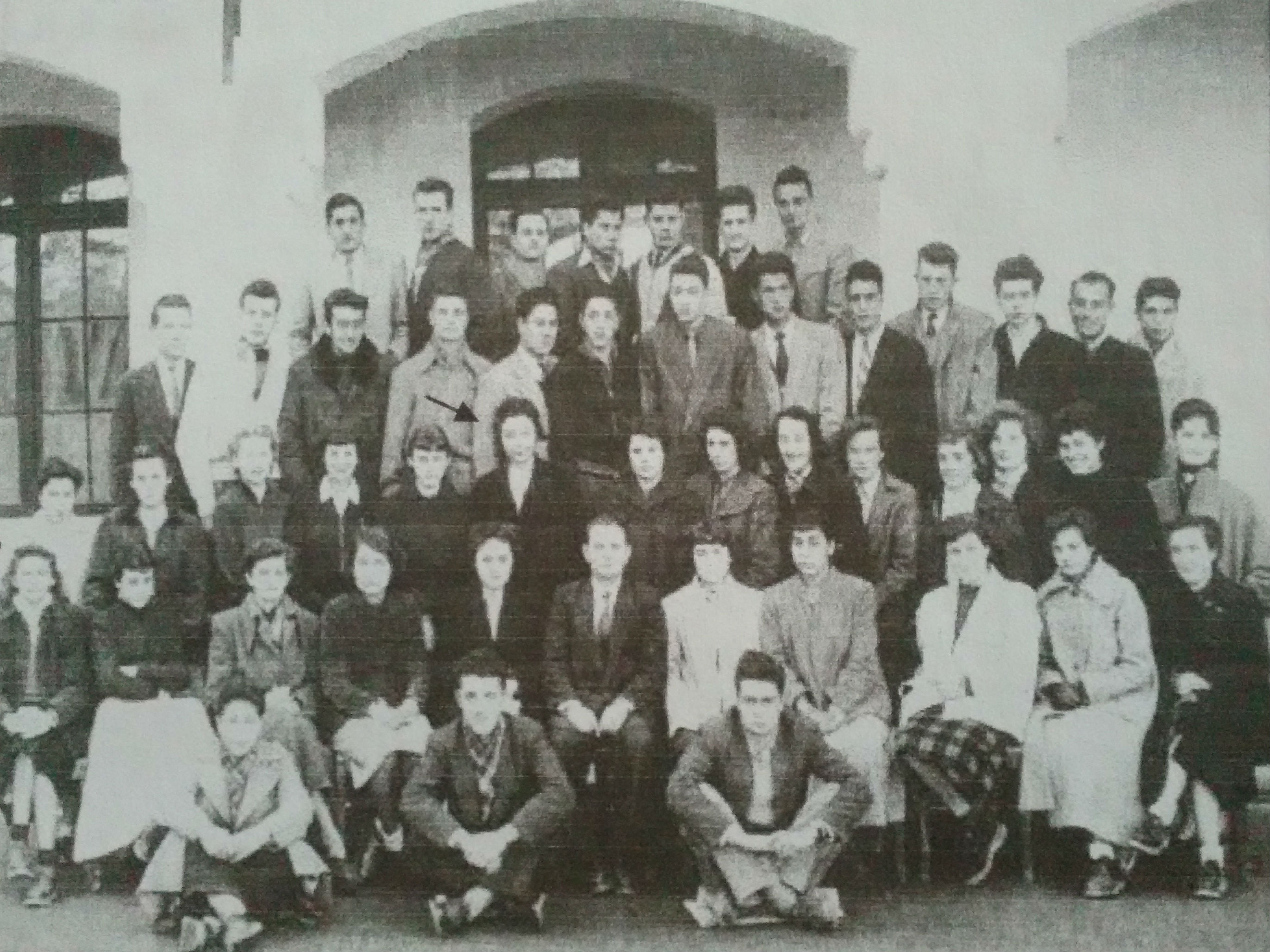 Meriem Bouatoura, 2em année lycée 1952-1953